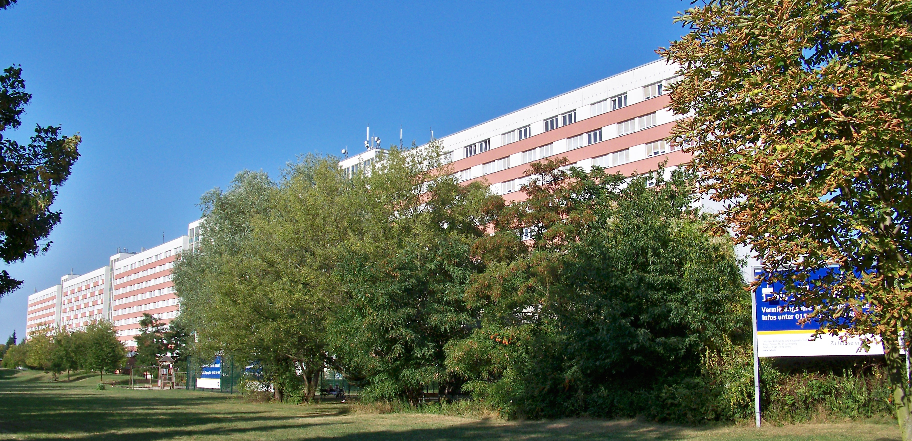 Lene-Voigt-Straße 2 bis 8 in Leipzig Probstheida. Es handelt sich um das längste durchläufige Wohnhaus in Deutschland (Stand: September 2009) mit zehn Etagen und vier Aufgängen. Im Volksmund Block genannt.